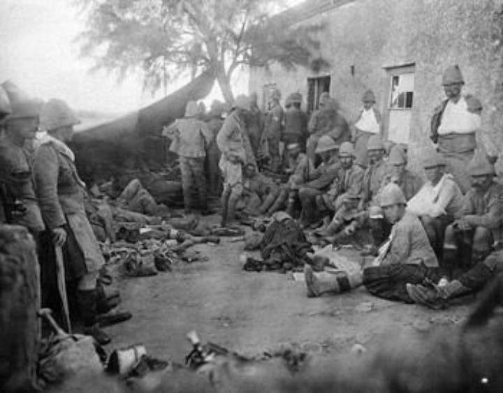 Soldati britannici feriti, principalmente highlanders, durante la battaglia di Paardeberg